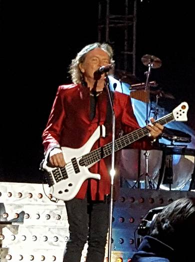 Red Canzian durante il concerto con i Pooh allo Stadio Olimpico di Roma nel 2016